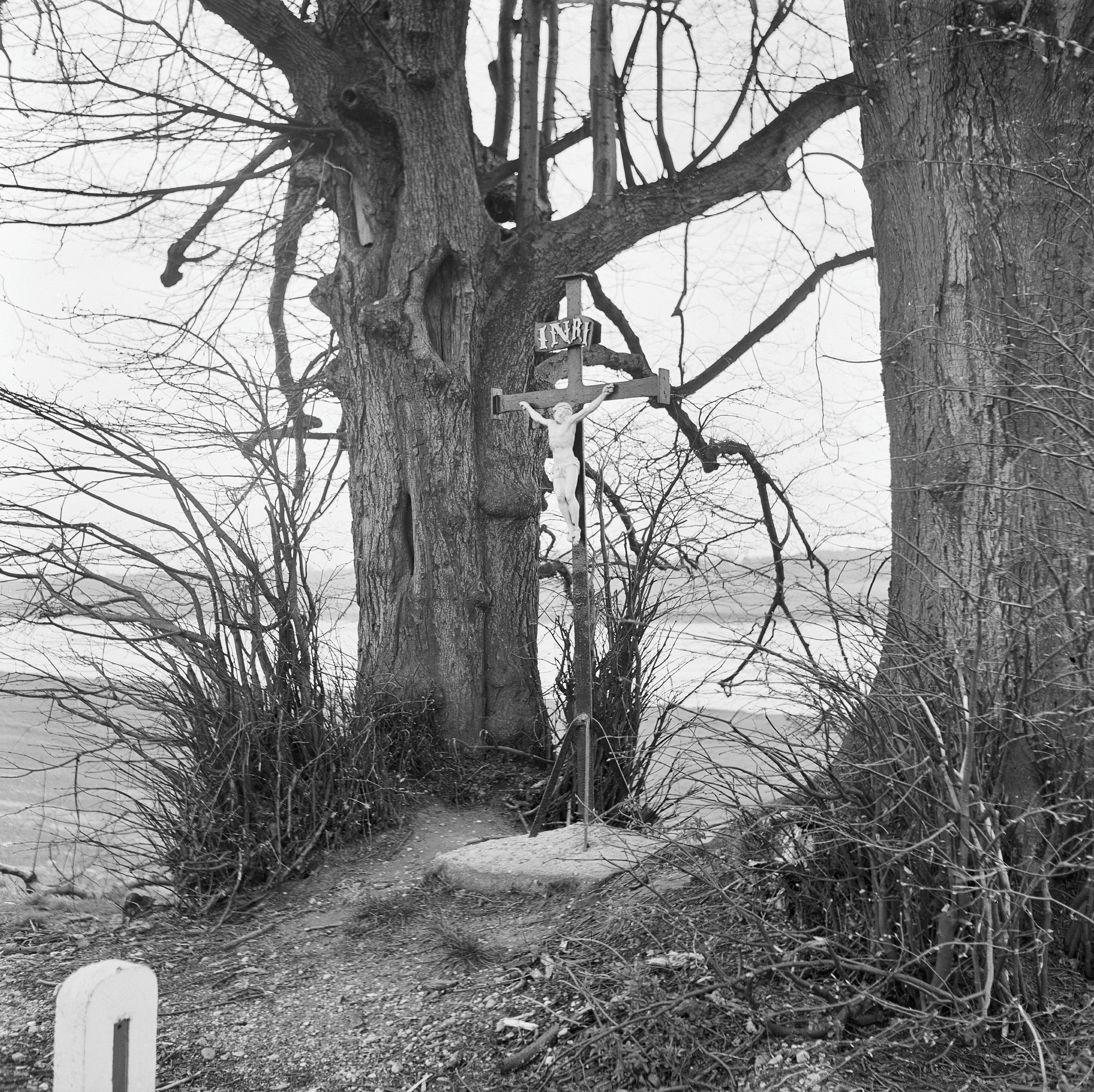 Wegkruis